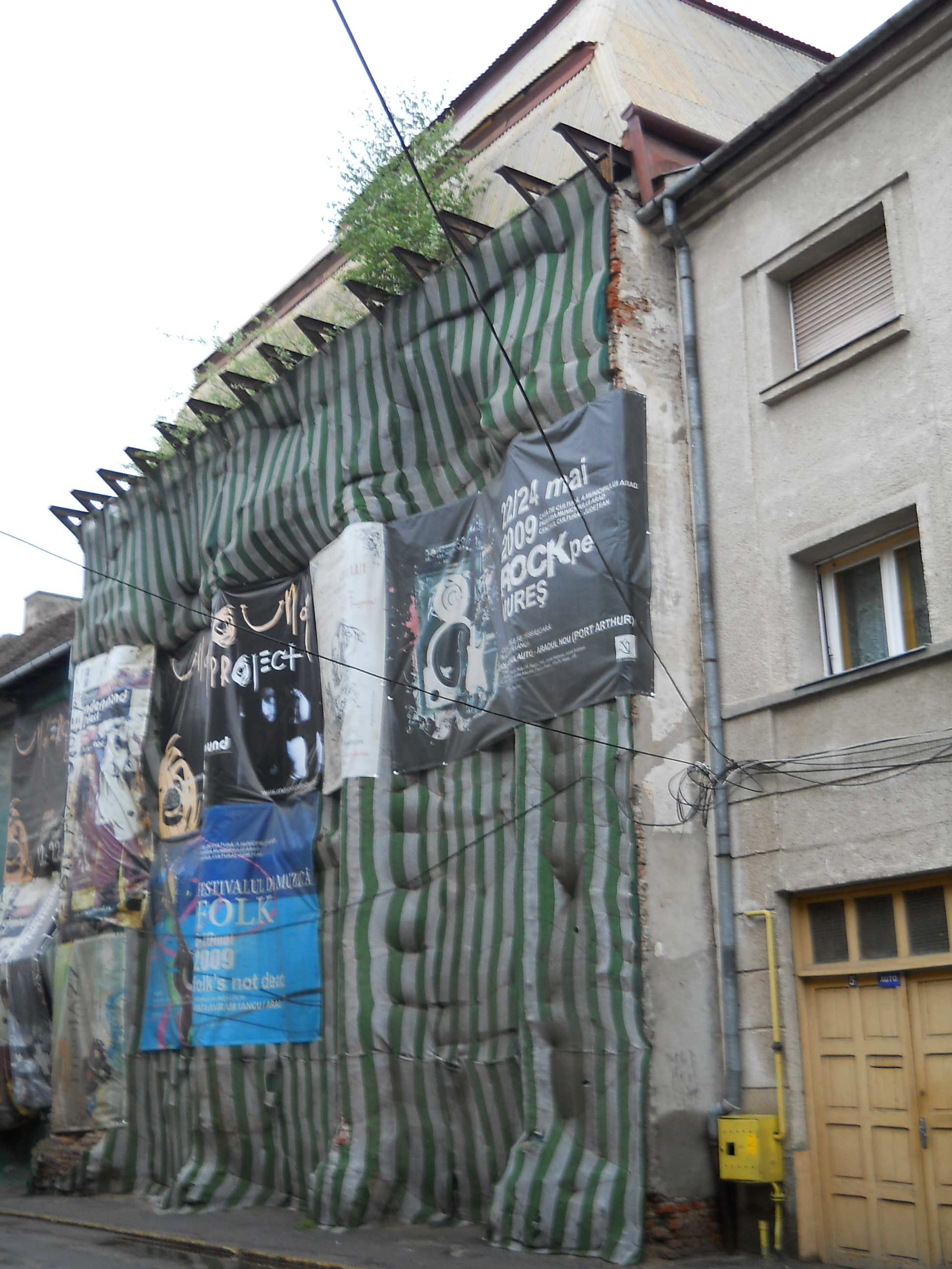 Vedere de ansamblu